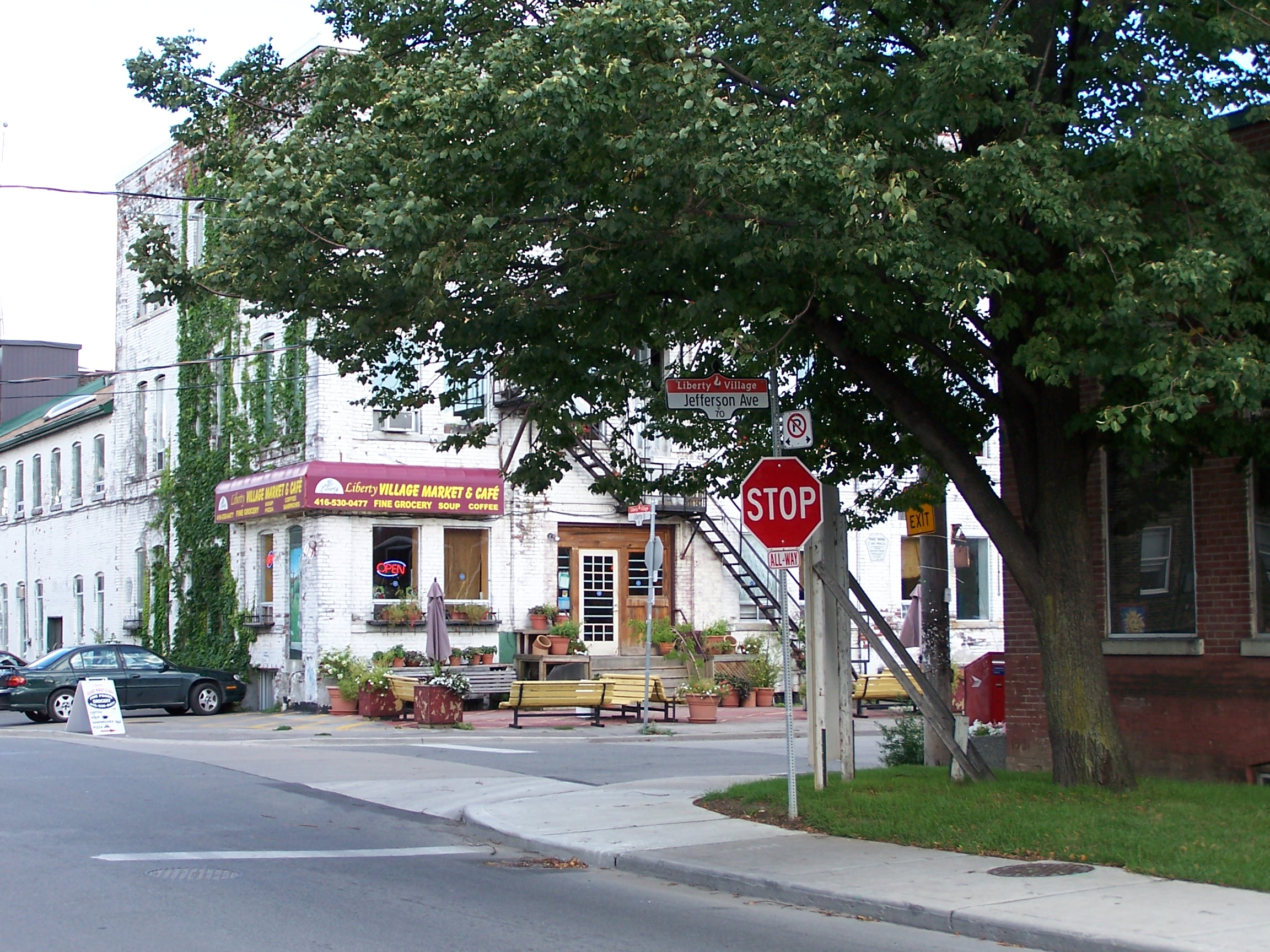 Essa "grocery" eu achei perto do local da ultima foto, na verdade nem sei porque eu tirei essa foto, mas ateh q ficou legal hehehehe. Abracos a todos. T+